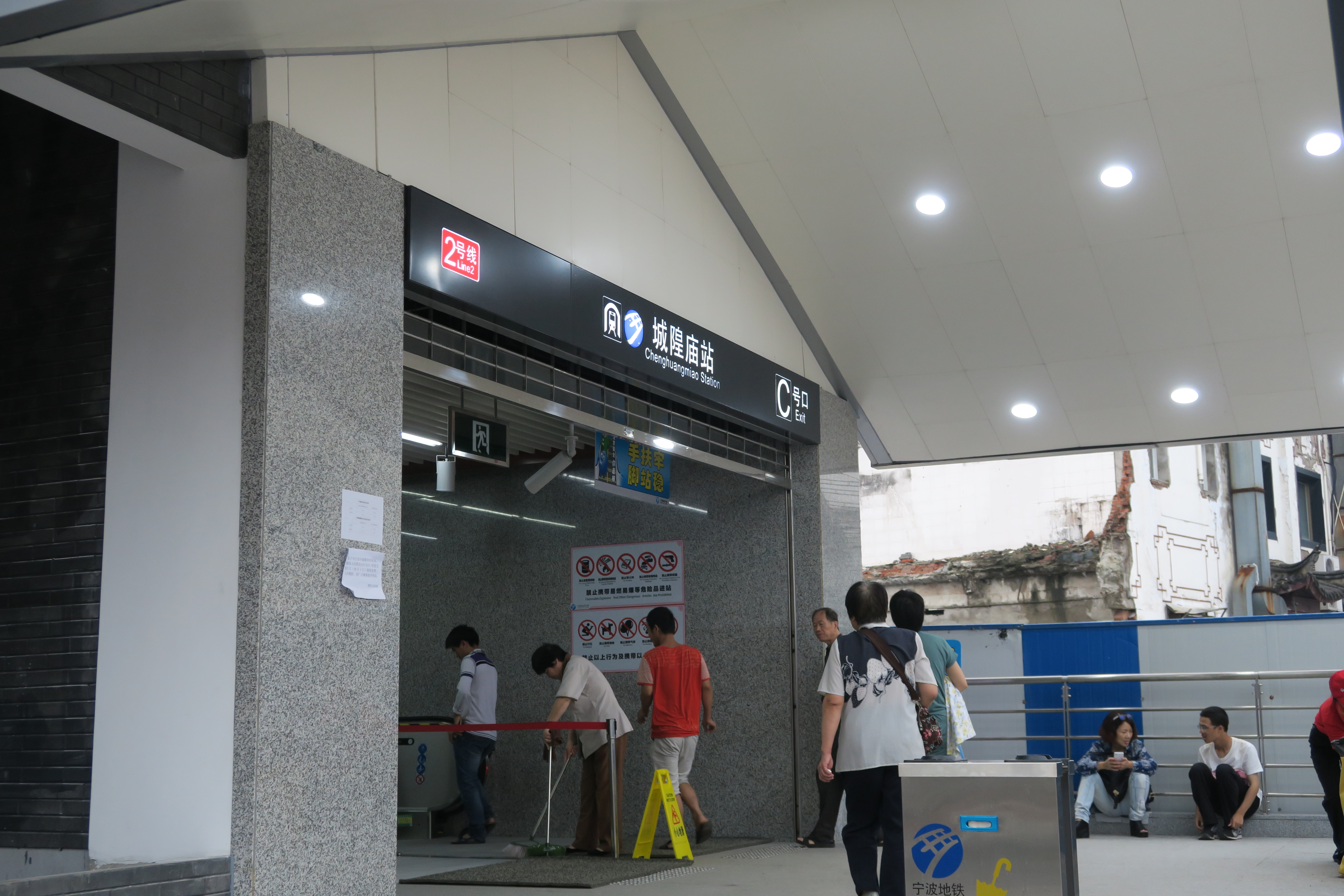 宁波地铁2号线城隍庙站